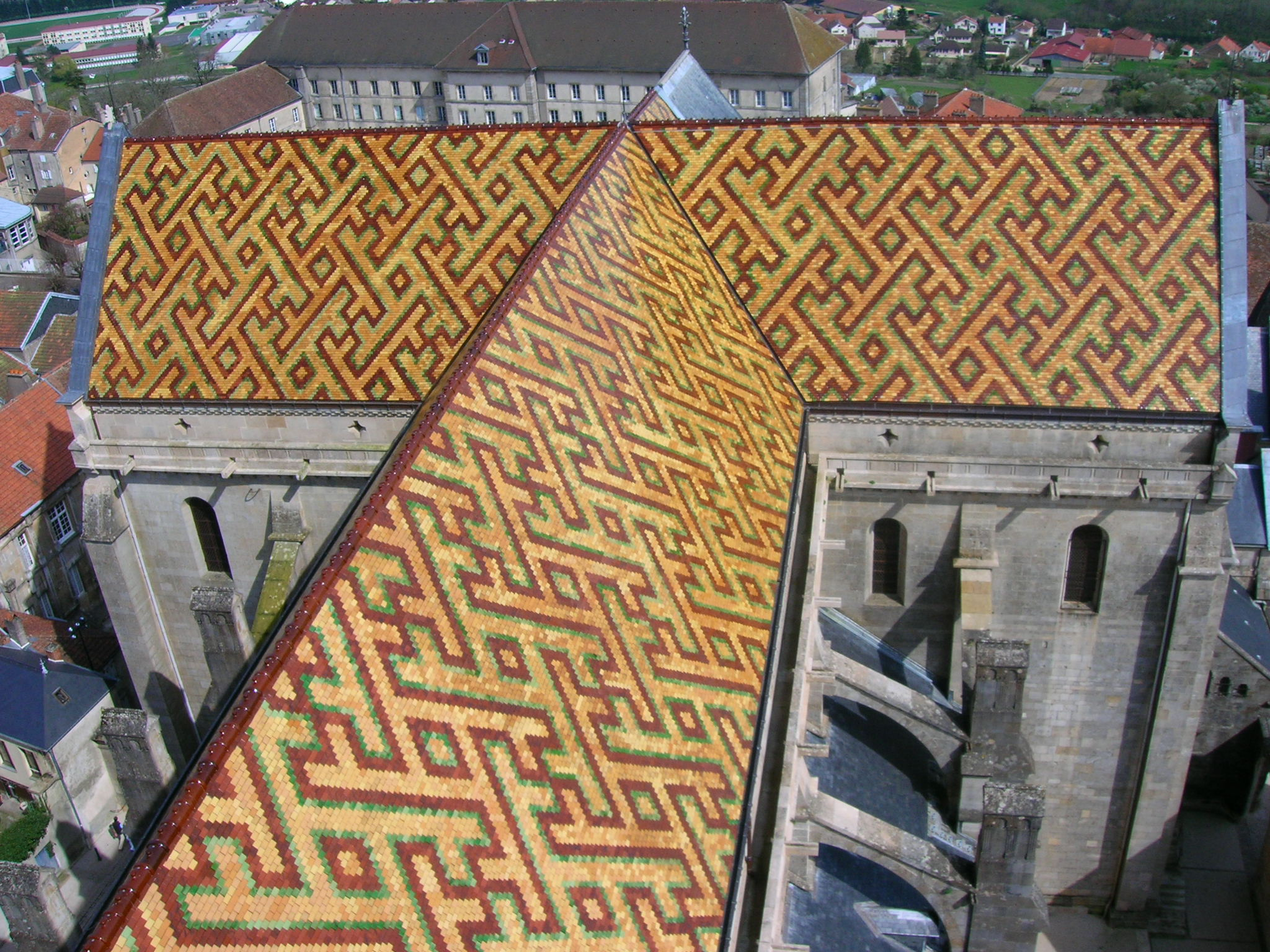 toiture cathédrale de langres